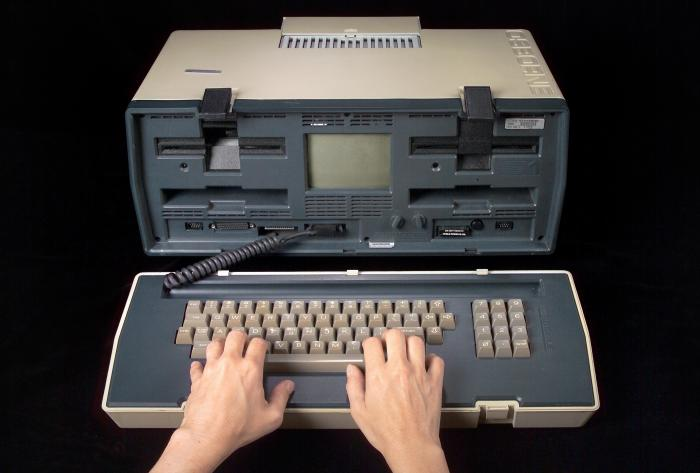 Ordinateur portable en 1982 PHIL ID#6012 Title:This early 1980’s model of a portable computer was the Global Health Odyssey’s Historical Object of the Month for August, 2004. Content Provider(s):CDC/GHO/Mary Hilpertshauser Creation Date:(2004) Description:Used at CDC in 1982, this 64K RAM model, which weighed 24.5 pounds, was the first true portable computer. This new technology allowed EIS officers to more accurately gather and transport data in the field. Source Library:PHIL Photo Credit:Jim Gathany Trouvé sur